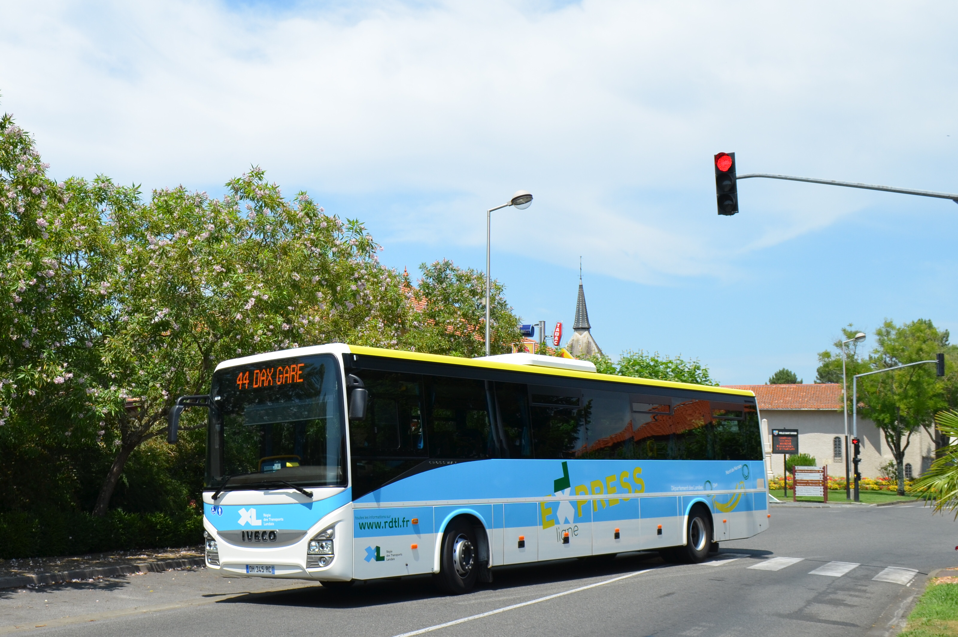 Iveco Bus Crossway n°:1418 sur la ligne 44 à Vieille-Saint-Girons Mairie.